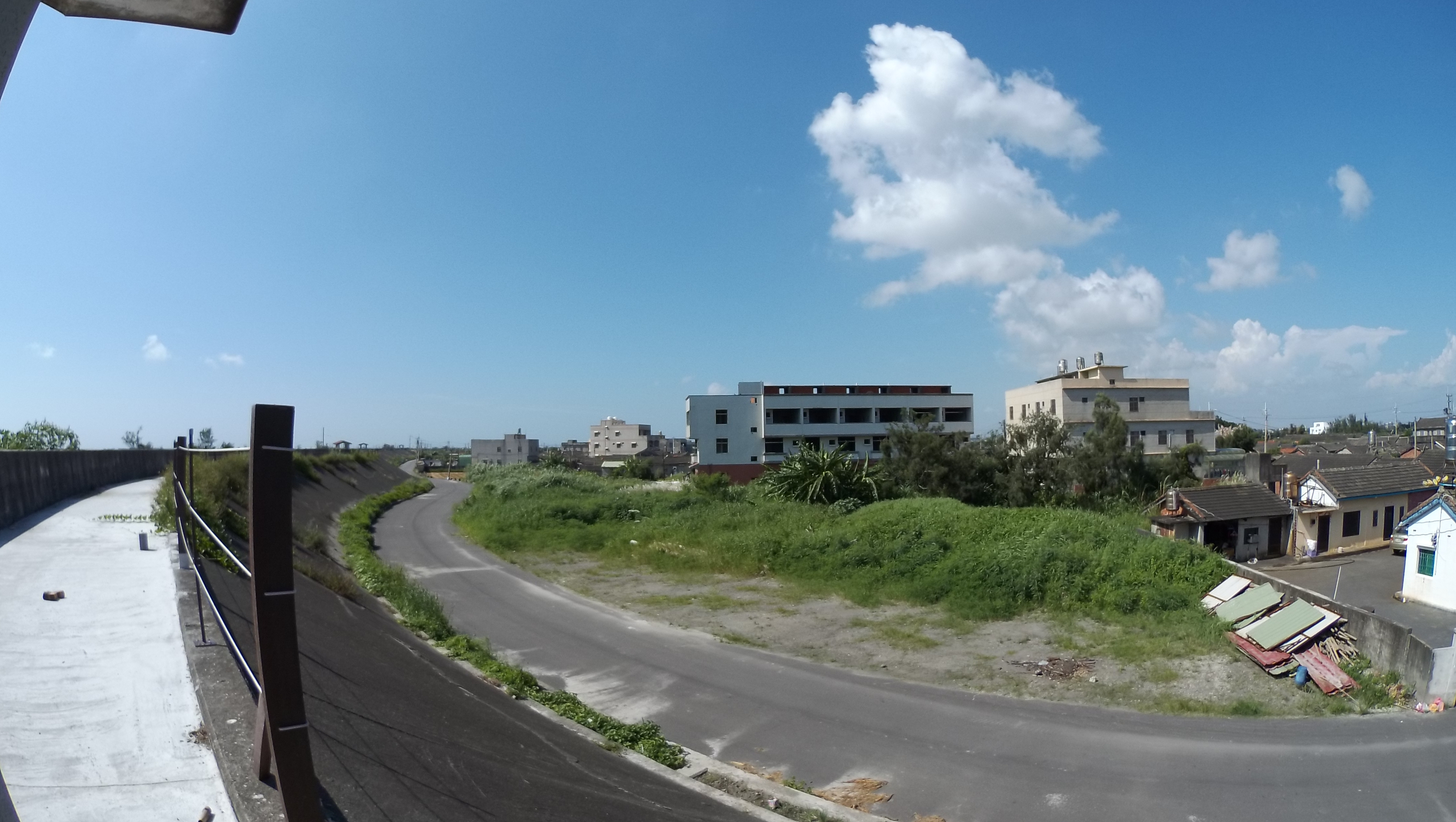 廢棄的建築，已成附近居民鴨子的住所